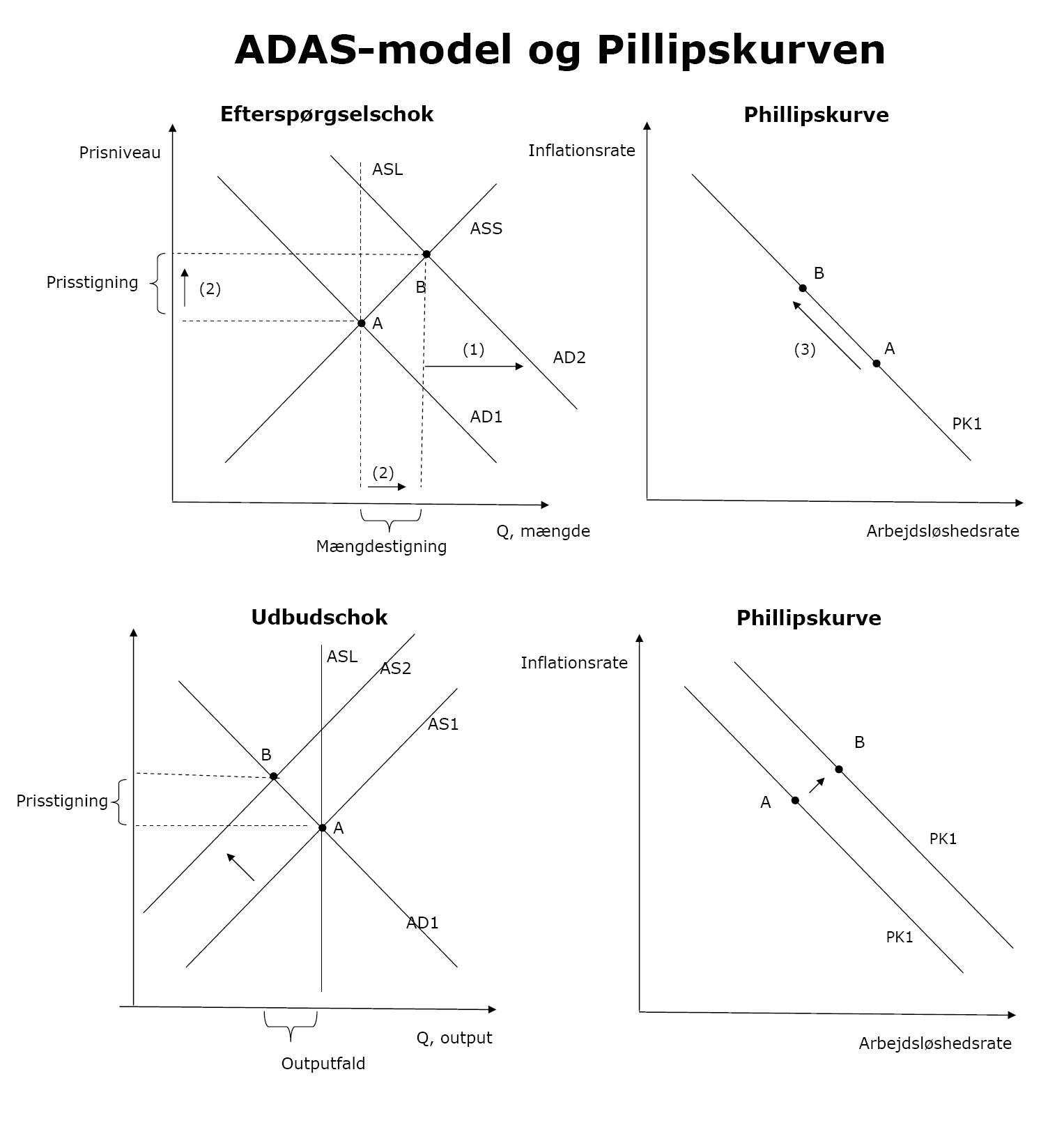 ADSL modellen og Phillipskurven